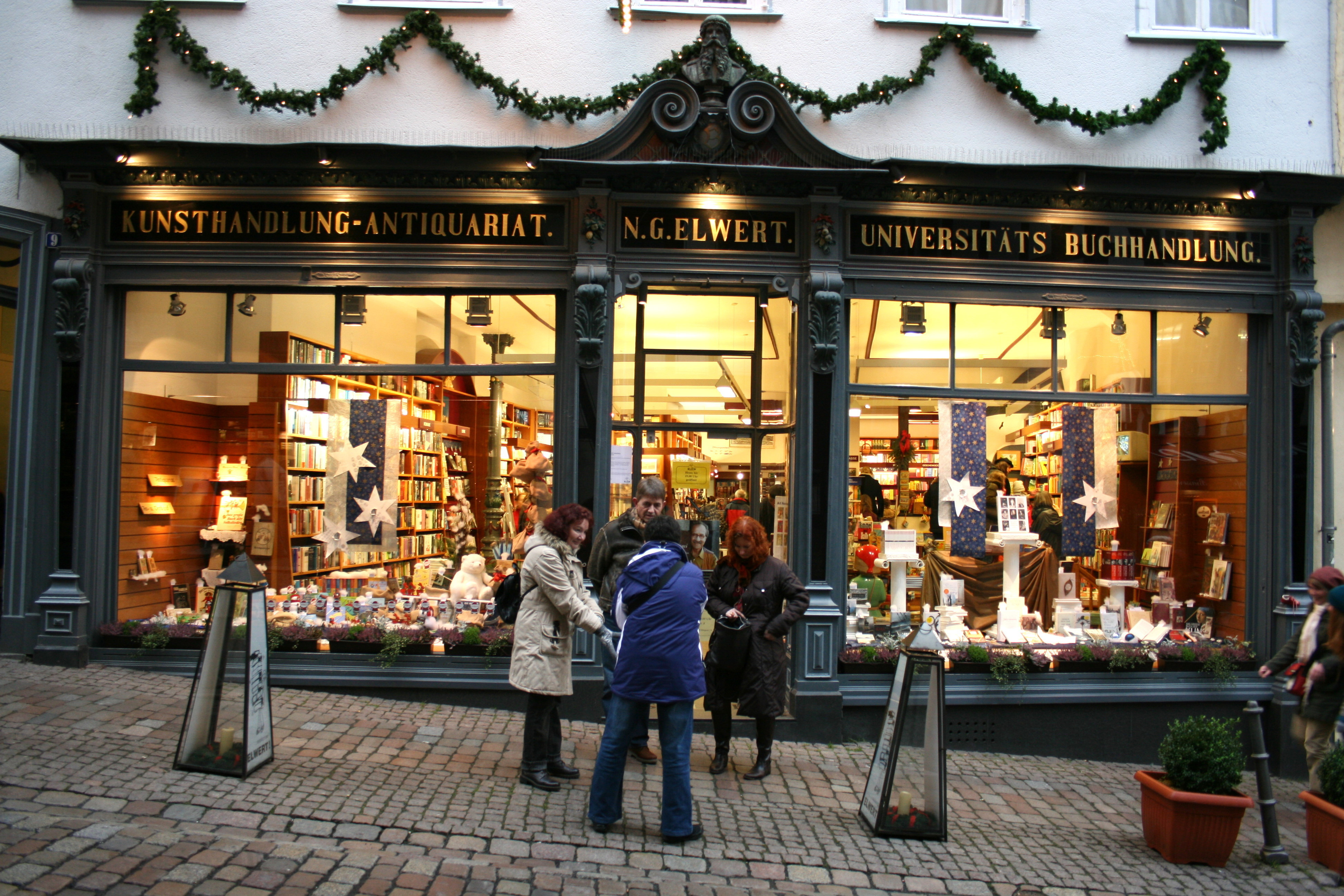 Reitgasse in Marburg